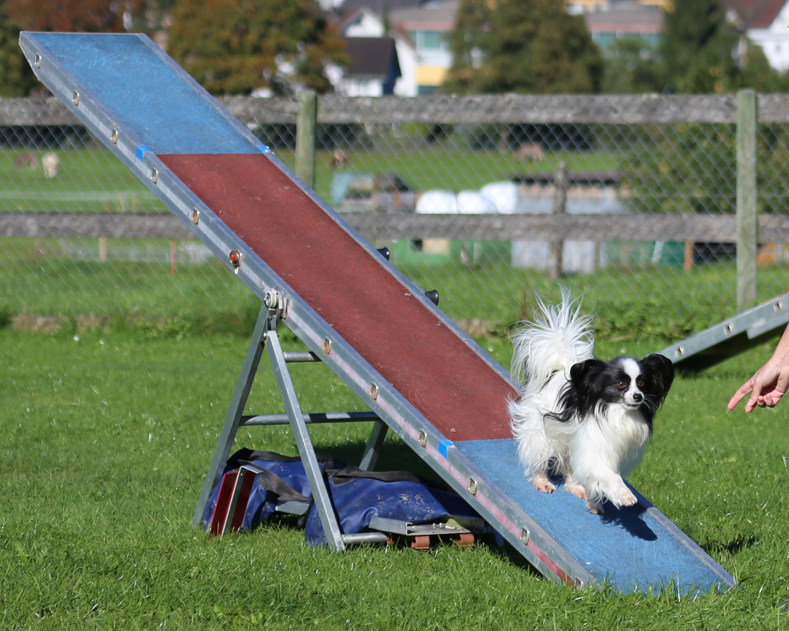 Agility-Wettkampf in der Ostschweiz – Papillon auf der Wippe